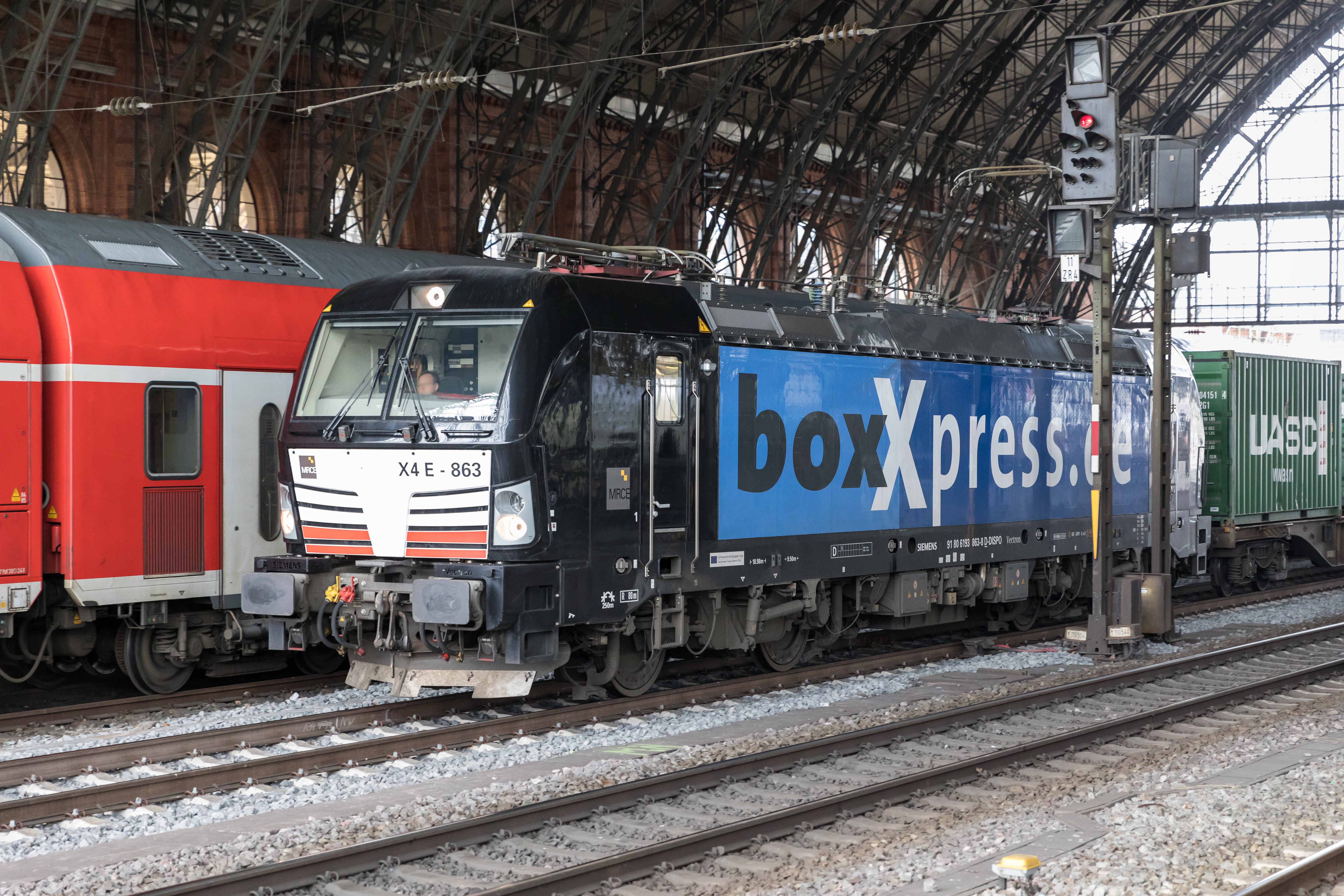 Siemens Vertron AC (Class 193), von MRCE an BoxXpress.de vermietet, durchfährt mit einem Containerzug den Bremer Hauptbahnhof